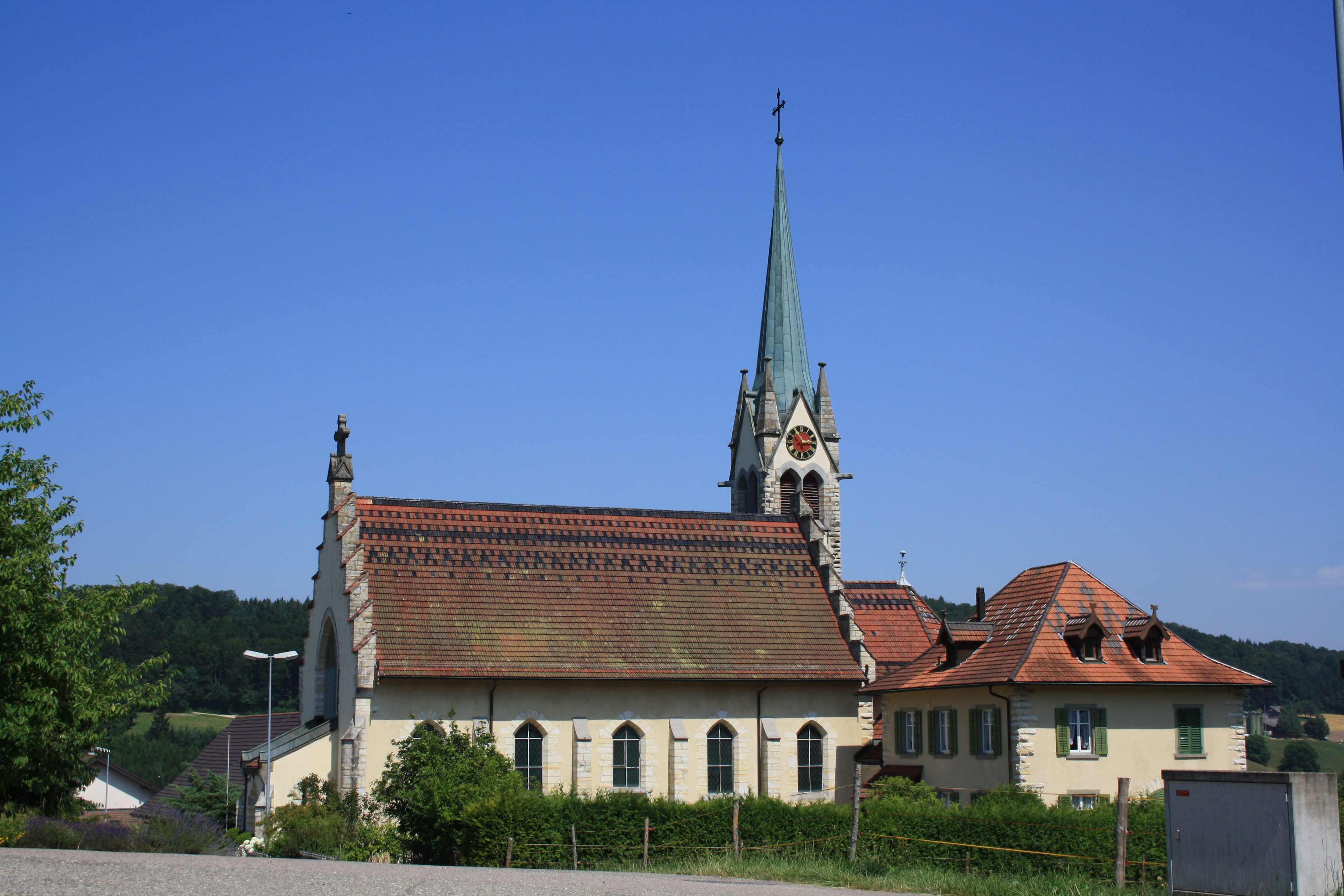 Katholische Kirche St. Agatha, Baldingen